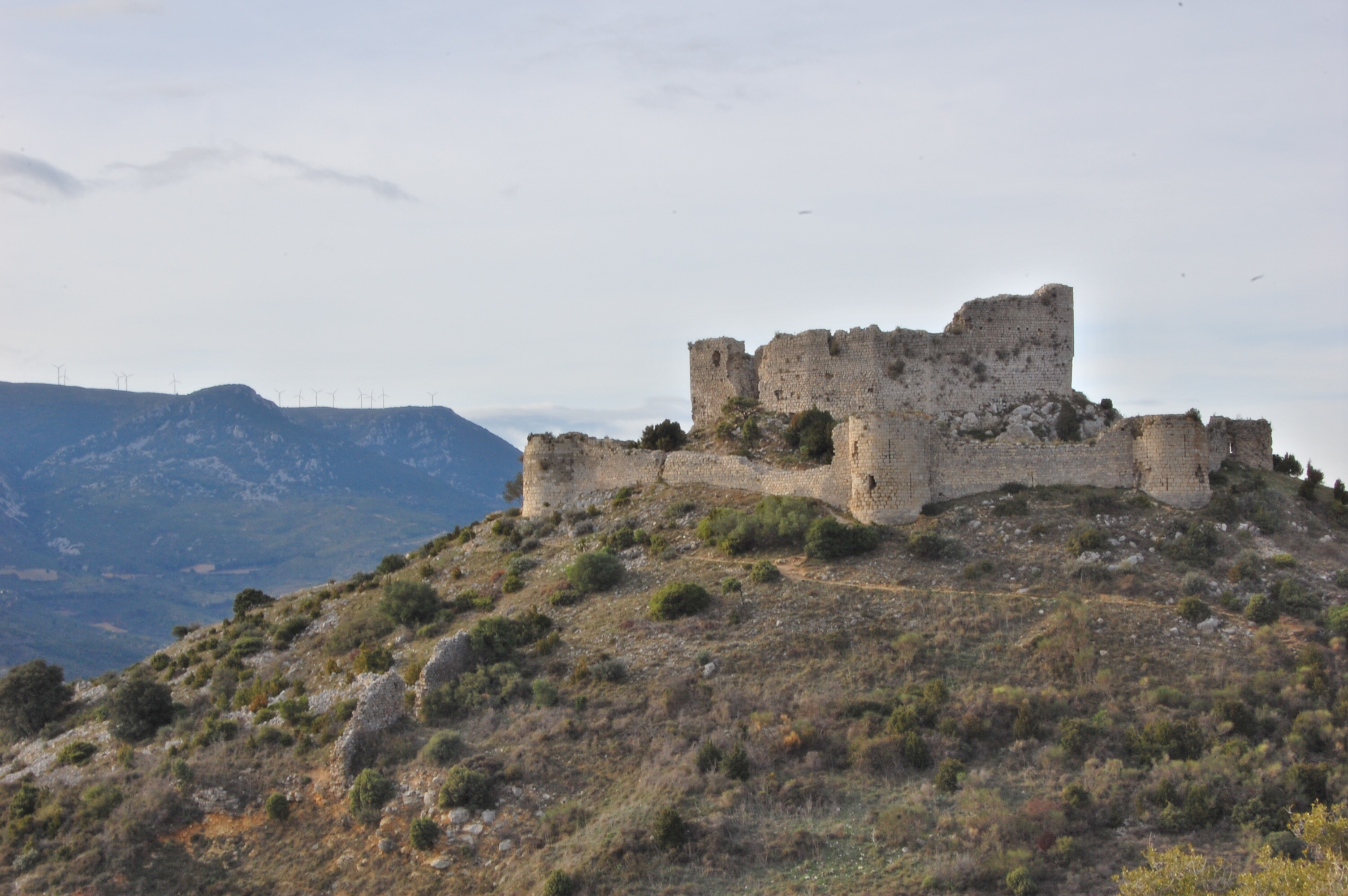 Le château d'Aguilar en pays Cathare